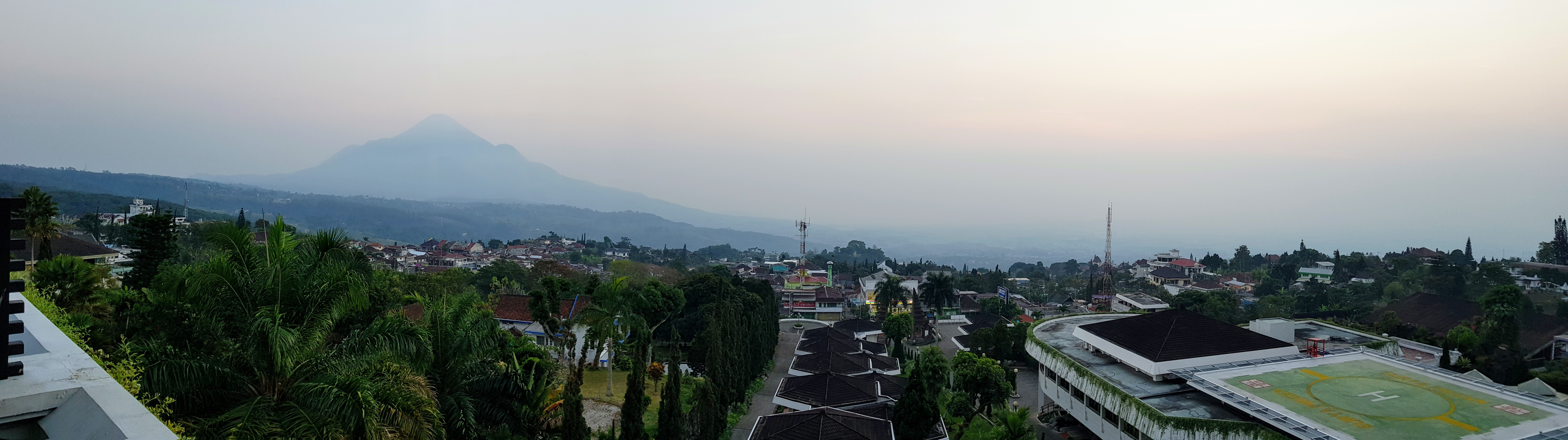 Surya Hotel & Cottages Prigen 2018-07-29